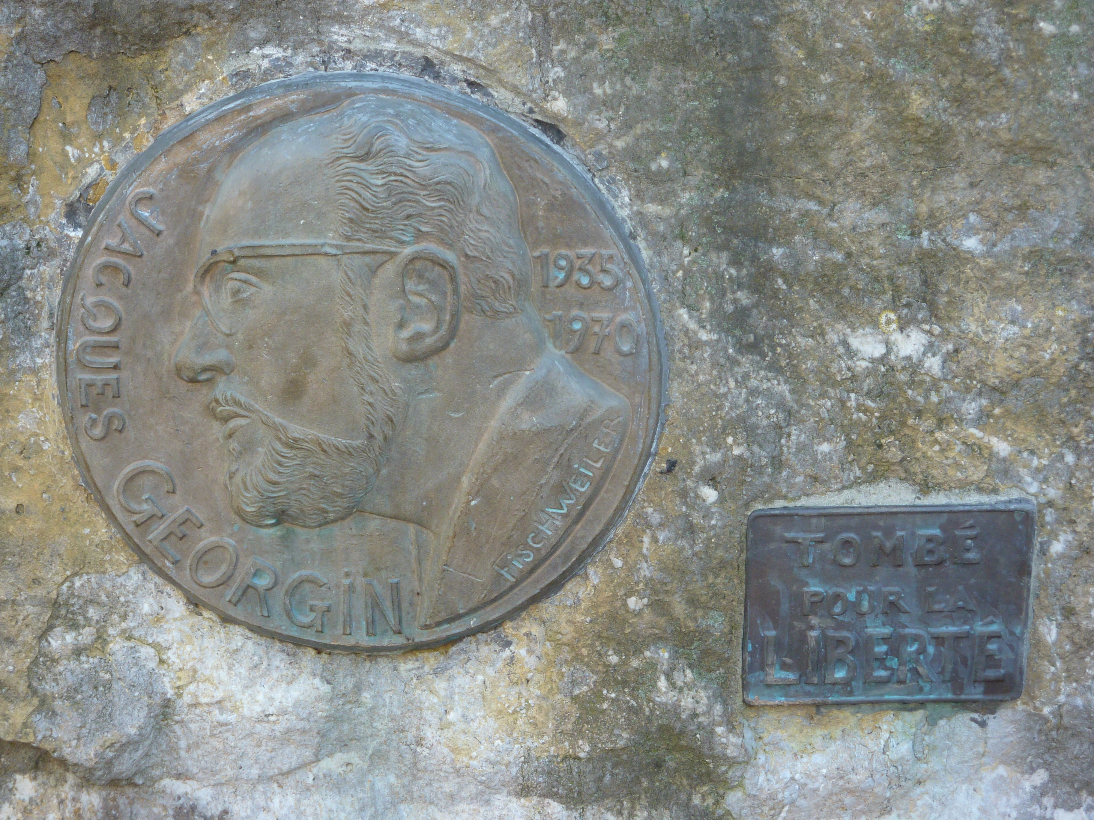 Stèle Jacques Georgin par Gustave Fischweiler, avenue Huart Hamoir à Schaerbeek, Bruxelles, Belgique.